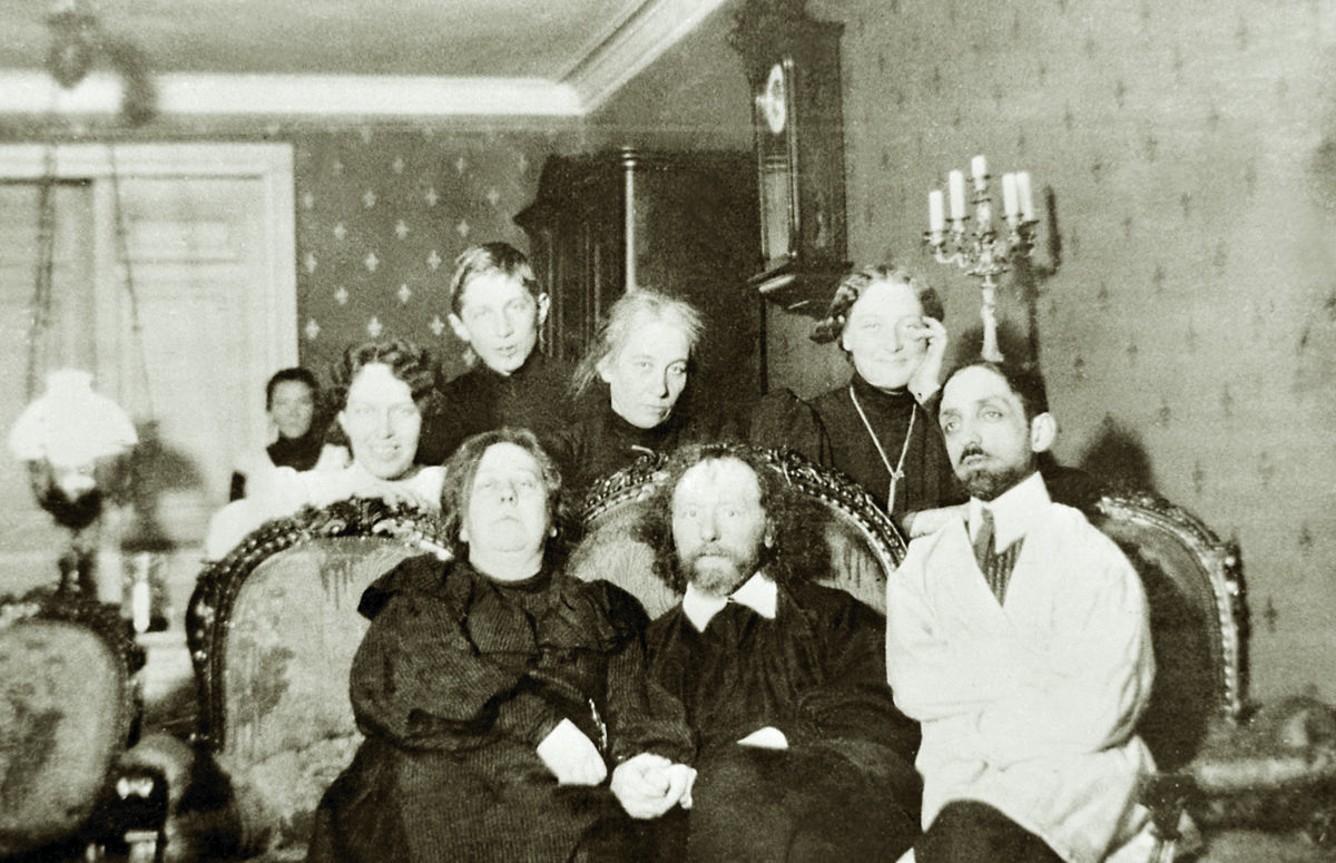 Сидят (слева направо): Анна Минцлова, Вячеслав Иванов, Михаил Кузмин. Стоят: Лидия Иванова, Евгения Герцык, Сергей Шварсалон, Мария Замятина, Вера Шварсалон